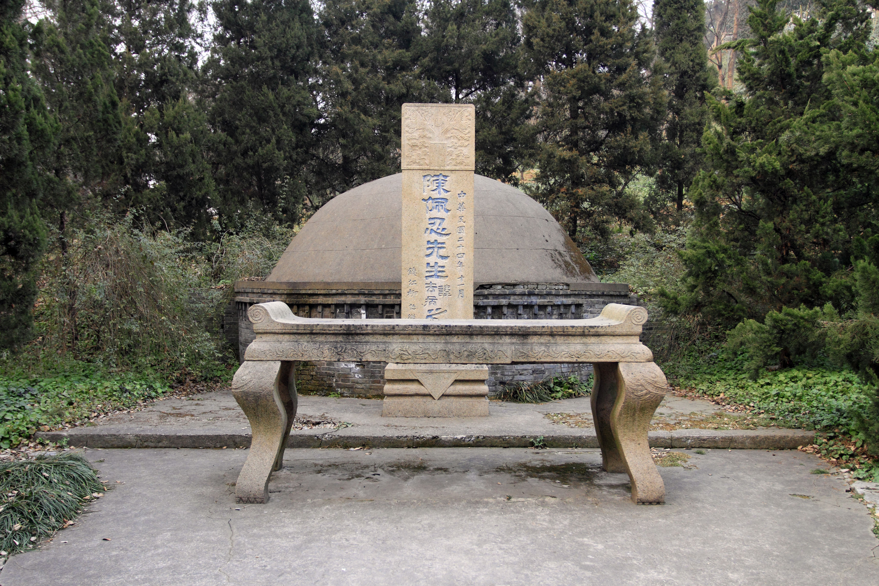 苏州陈去病墓，苏州市文物保护单位